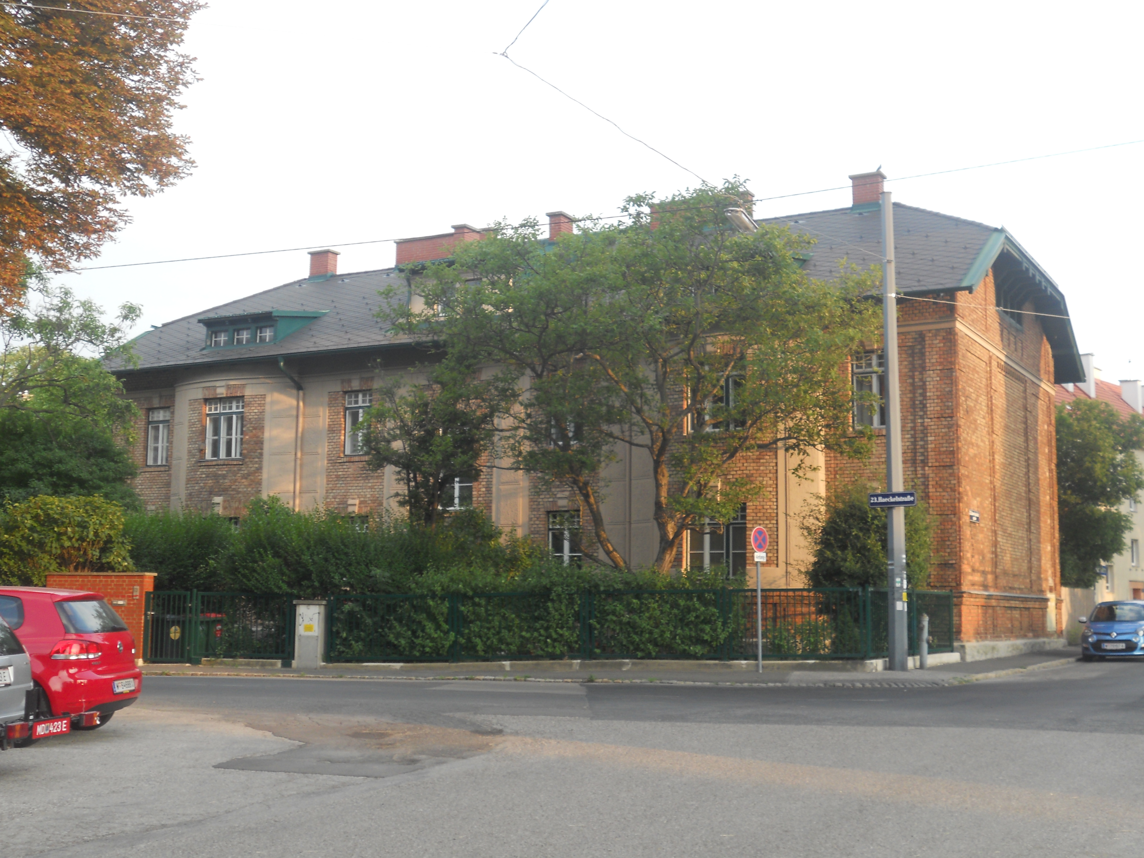 Arbeiterwohnhaus der Liesinger Brauerei, Haeckelstraße 35